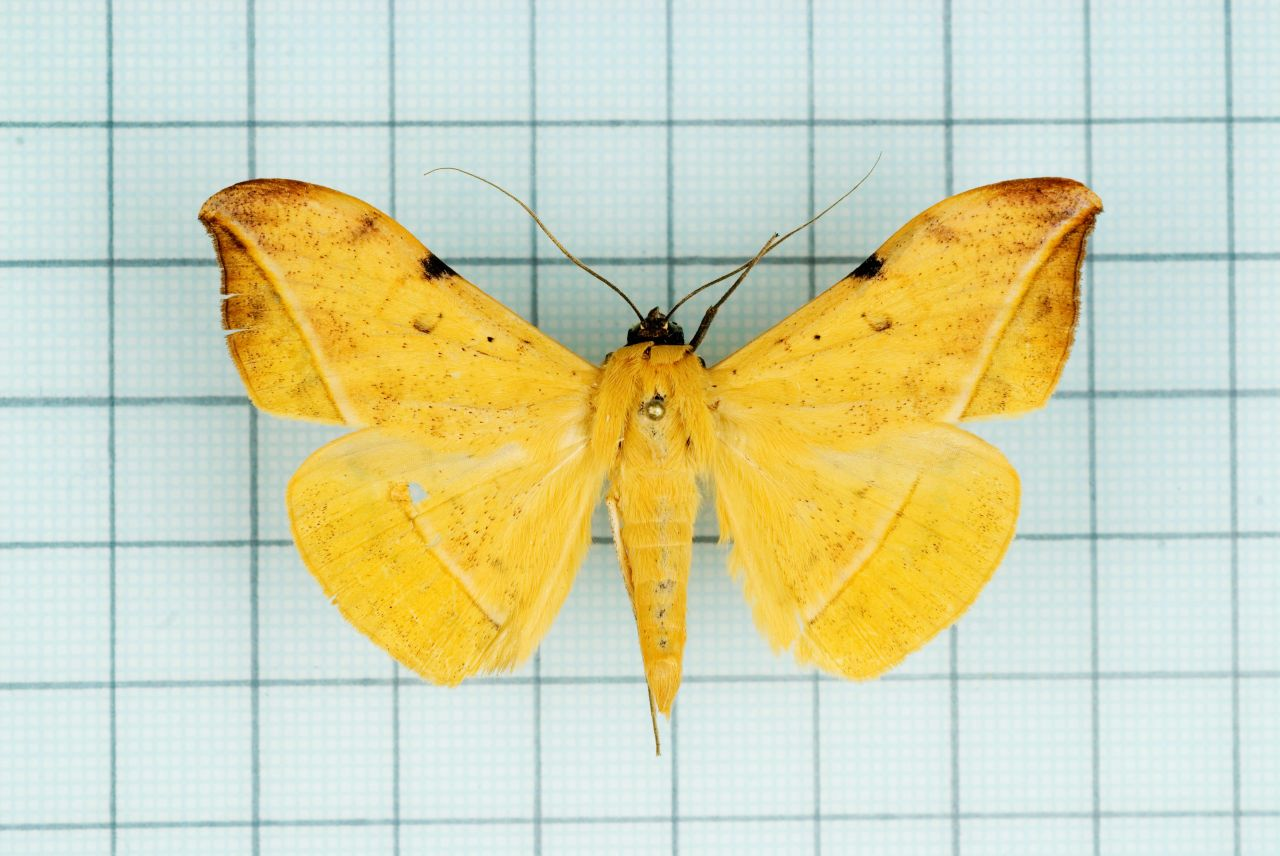 Hamodes propitia (Boisduval, 1832) 認識台灣的昆蟲 14夜蛾科 P.47